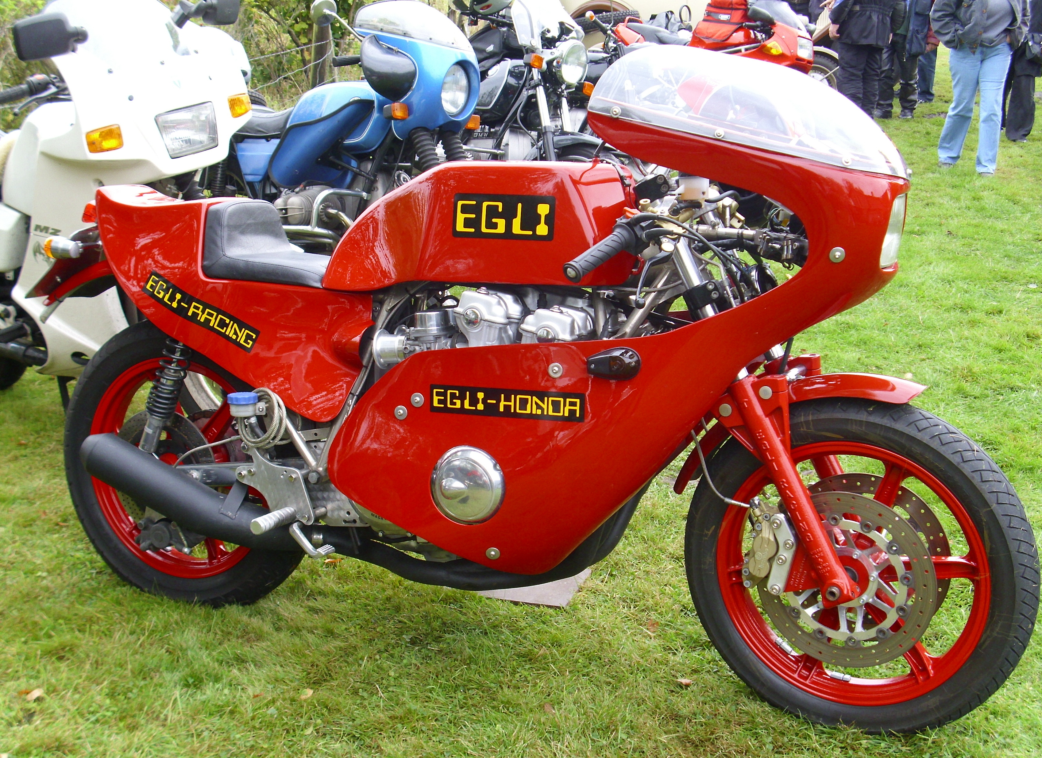 Egli-Honda (Honda CB750) beim Oldtimertreffen auf dem Gelände des Speichenmuseum in Klein Offenseth-Sparrieshoop